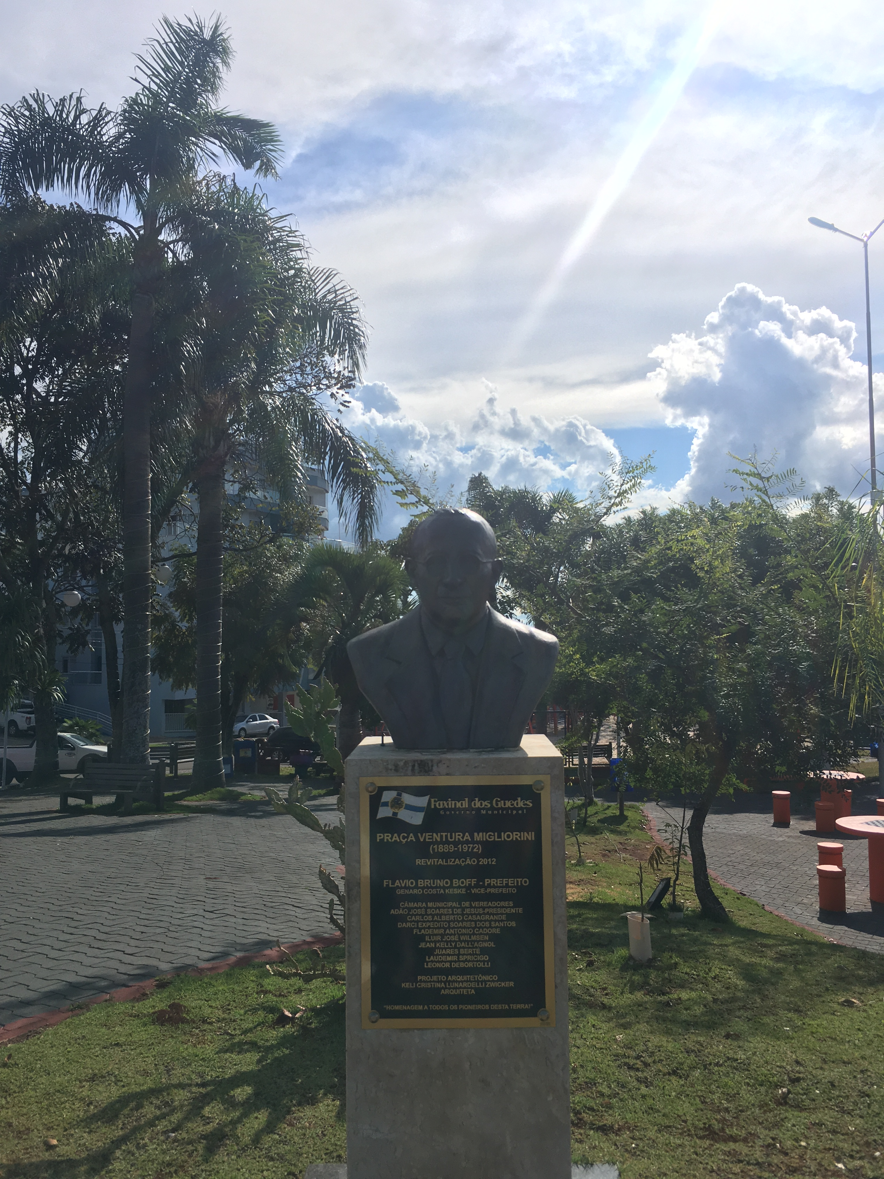 Monumento